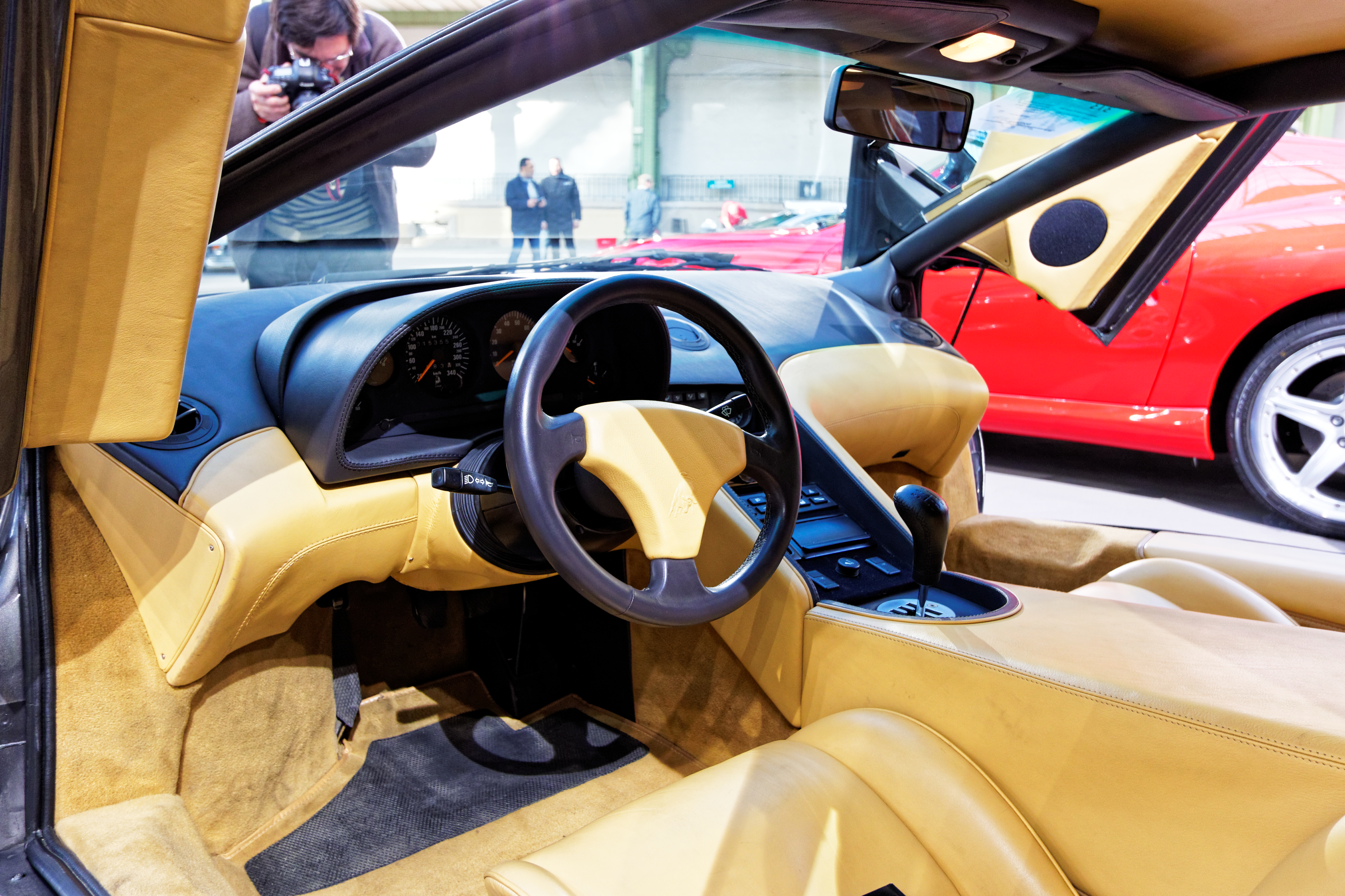 Un des véhicules présenté lors de la vente aux enchères Bonhams 2016 au Grand Palais de Paris.